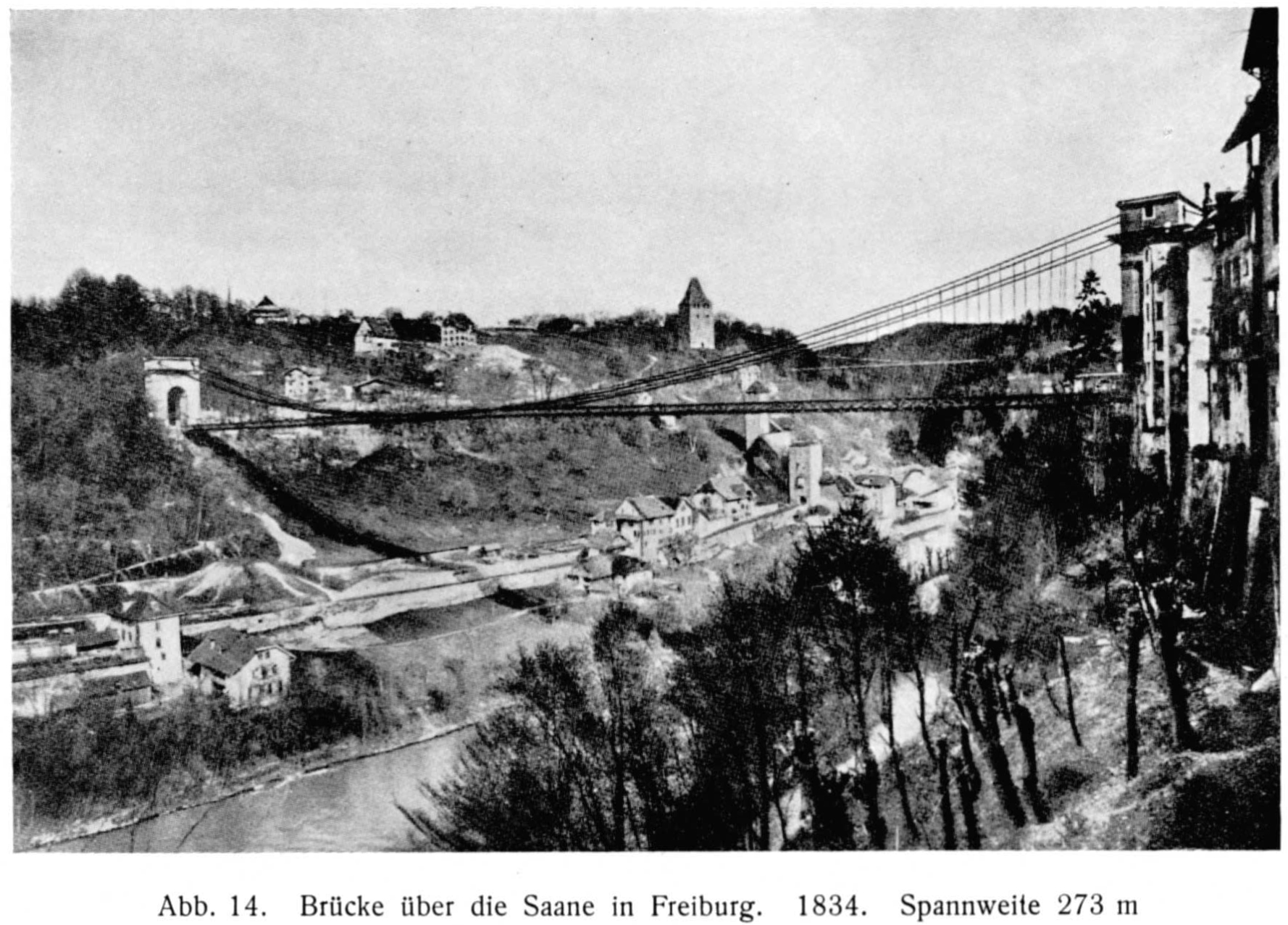 Fotografie der alten Zähringer Hängebrücke in Freiburg. Im Hintergrund das Berntor und die alte Galtern-Brücke